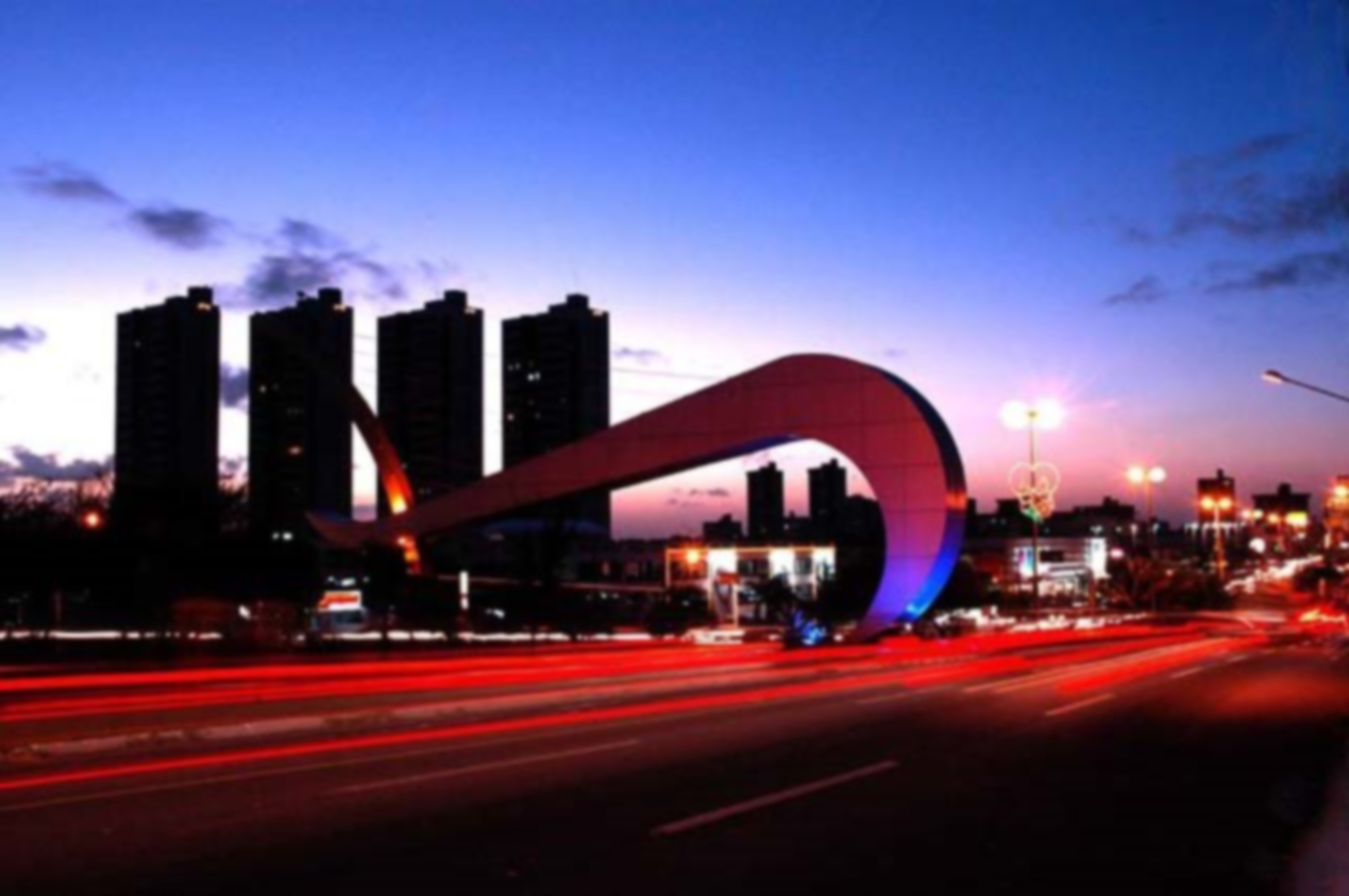 Arco do Sol, localizado na Avenida Engenheiro Roberto Freire (ou Estrada de Ponta Negra). Pórtico construído em homenagem aos 400 anos de Natal-RN. Localiza-se em Natal-RN.